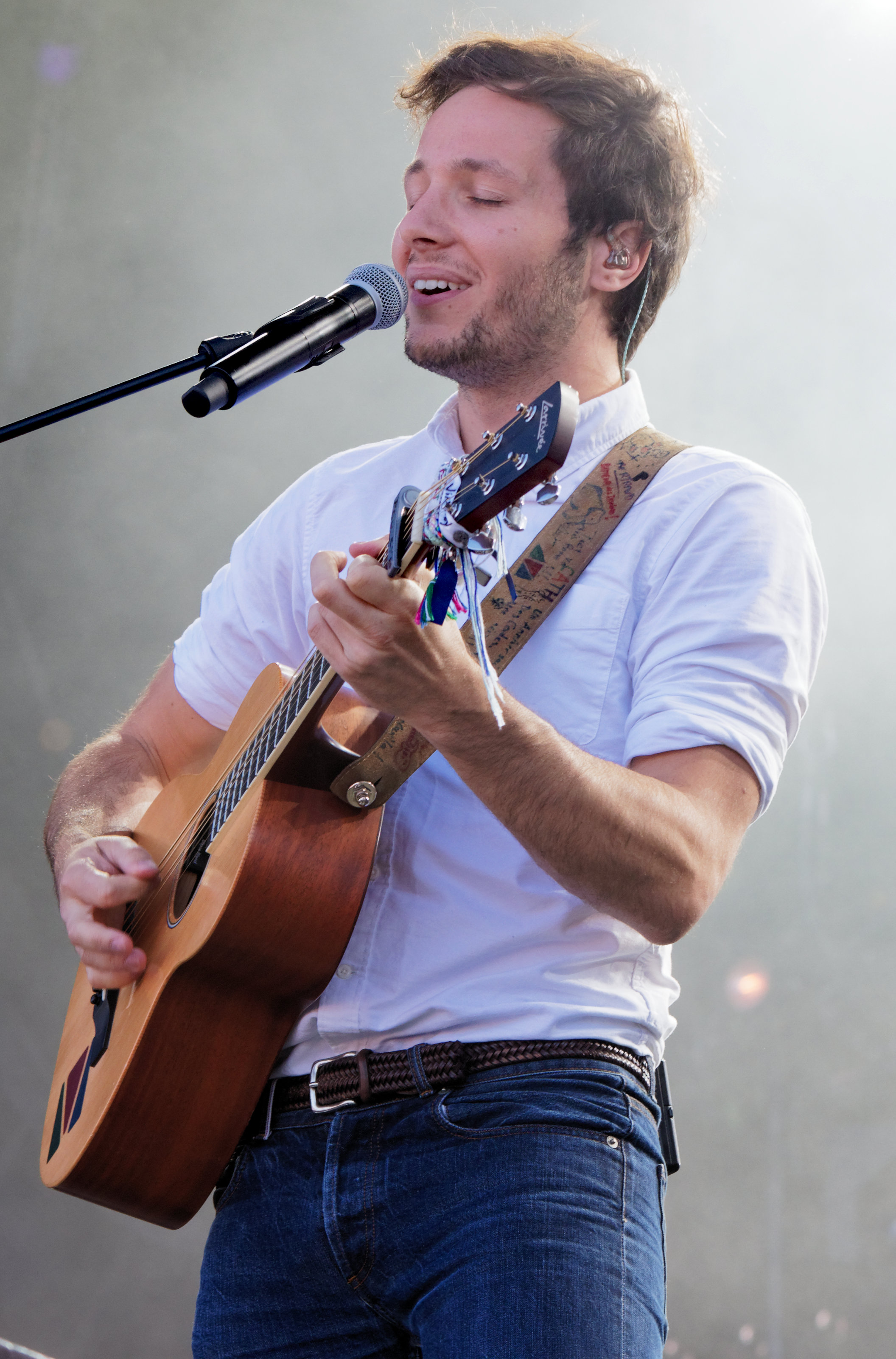 Vianney en concert lors du festival des vieilles charrues 2017